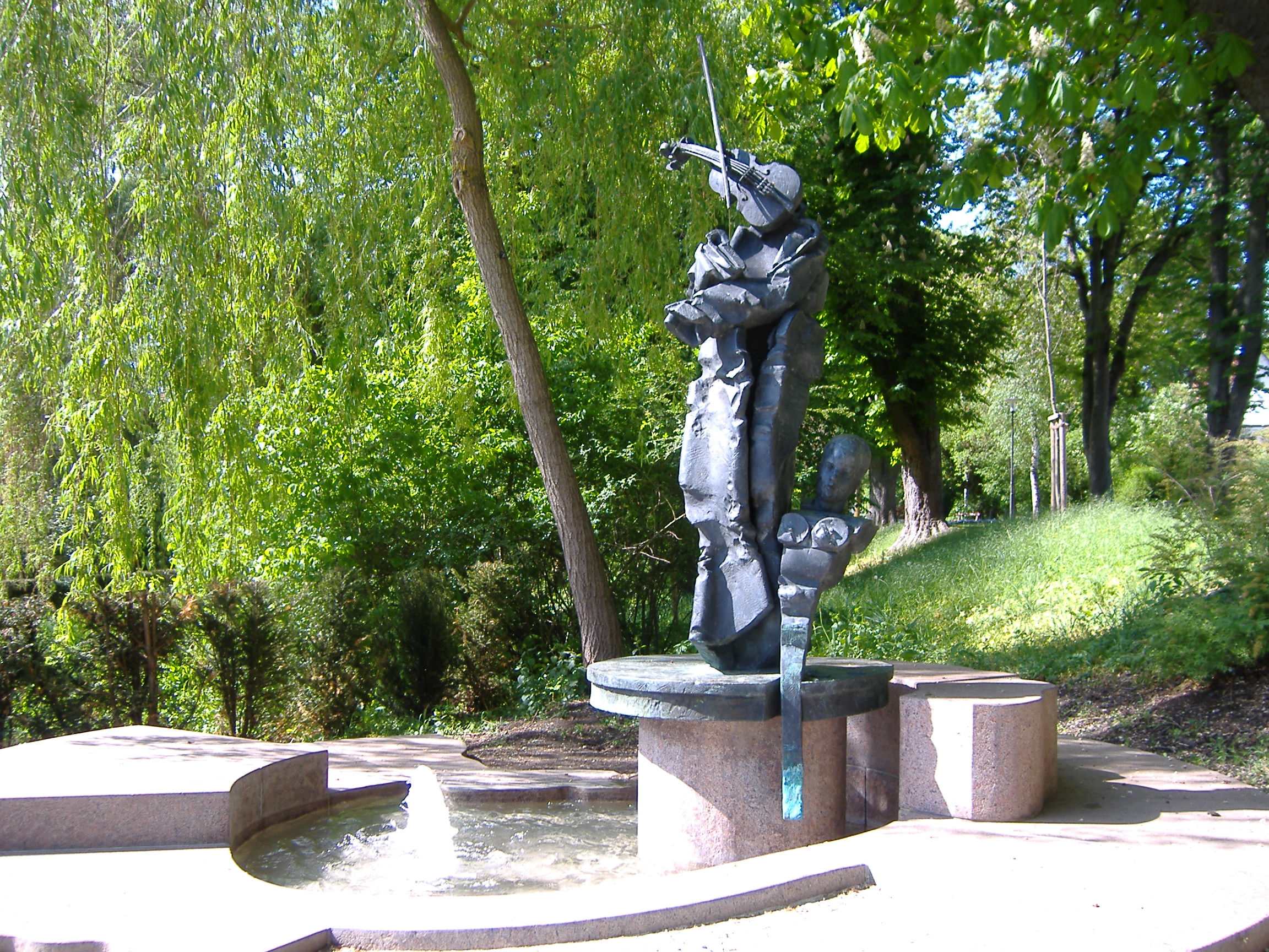 Werner Egk Brunnen in Donauwörth